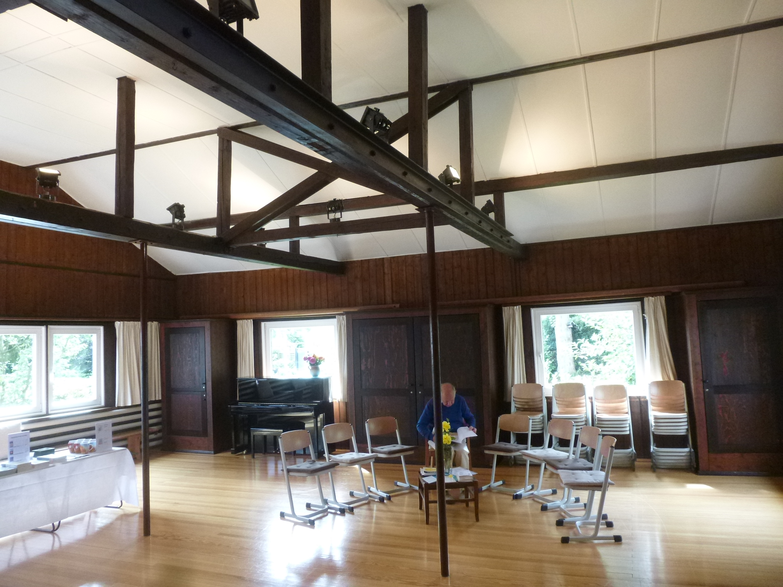 Dore Jacobs Haus Übungsraum